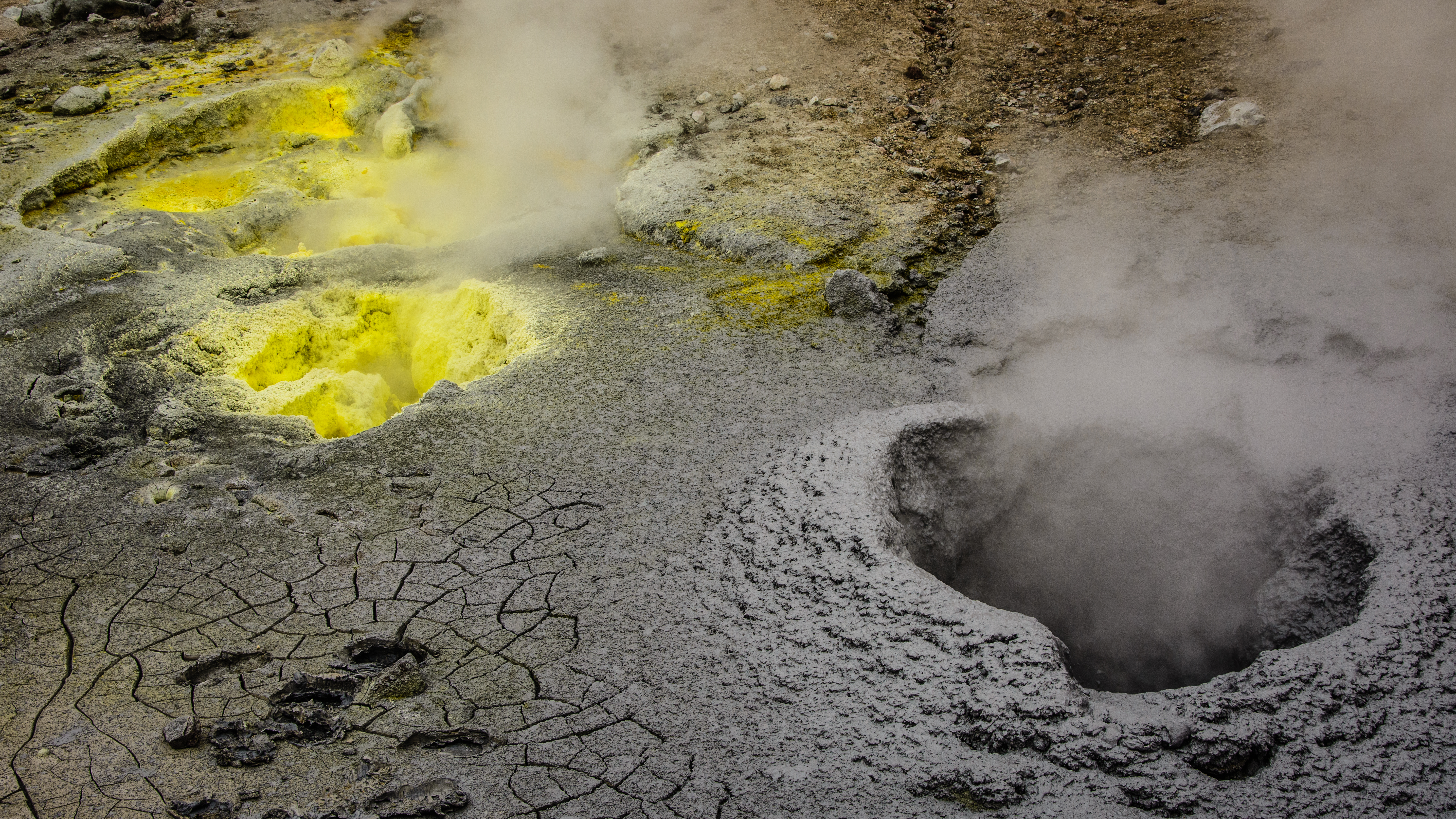 Fumarole emitting sulfur gases on volcano Mutnovsky, Kamchatka, Russia